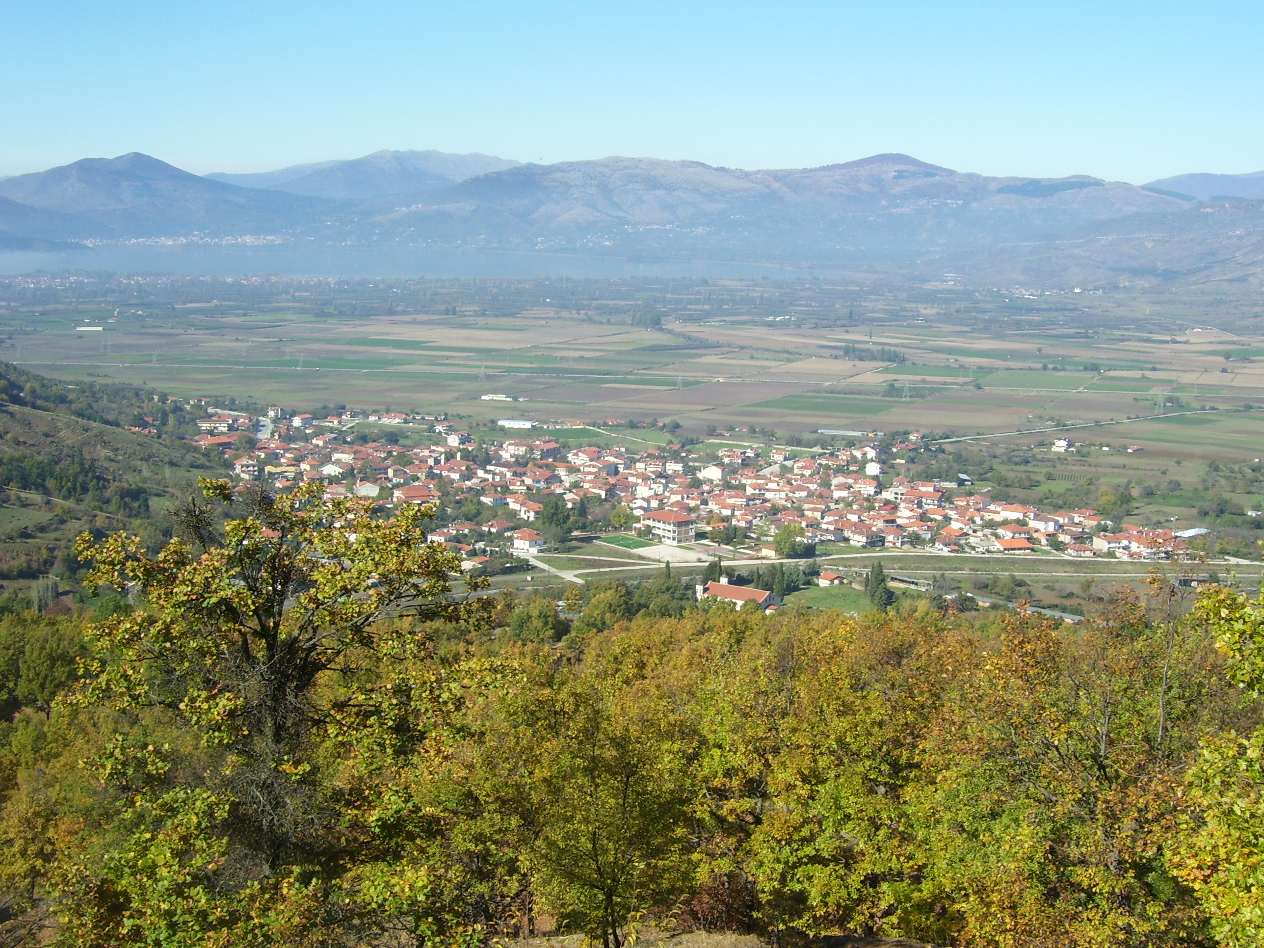 Панорама на Горенци (Корисос) от Синяк, в дъното Костурското езеро.